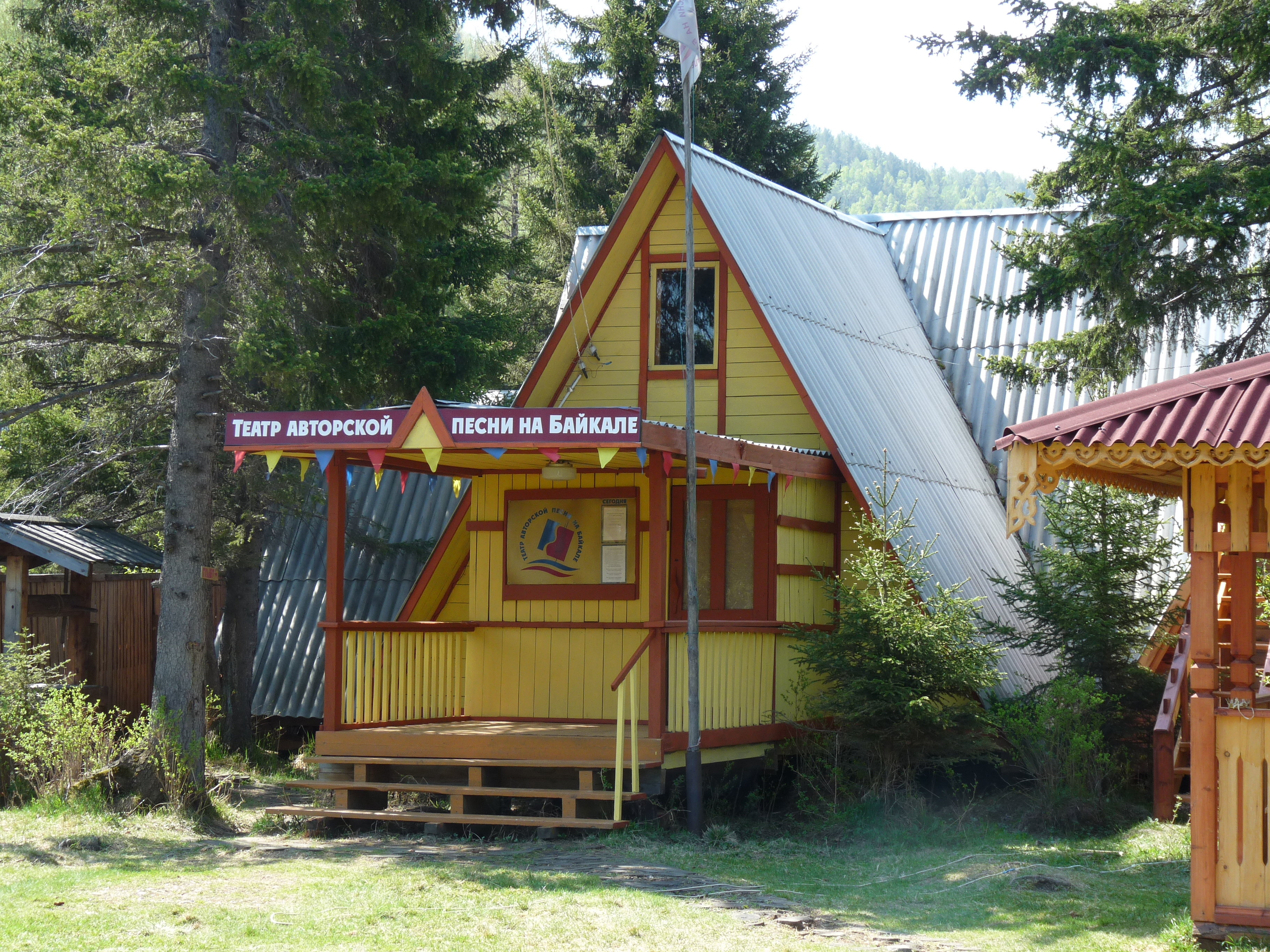 Фотография выполнена в августе 2011 года и загружена на Викисклад для публикации в статье Кравкль, Евгений Николаевич